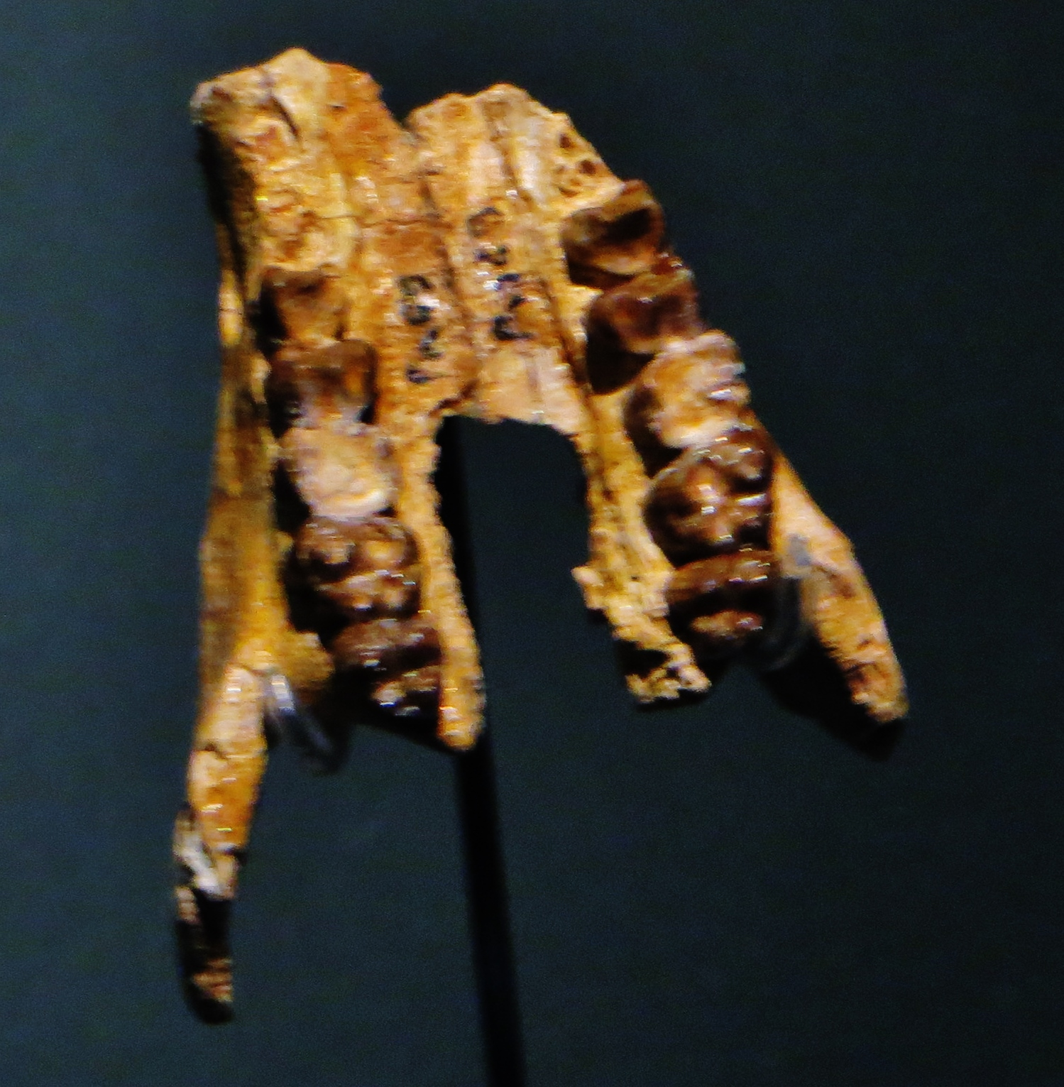 Fossil - Took the picture at Musee des Confluences, Lyon